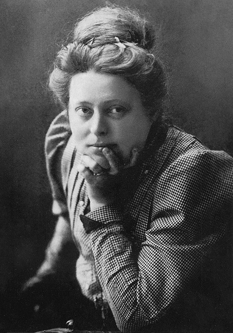 La pintora serbia Nadežda Petrović (1873-1915)